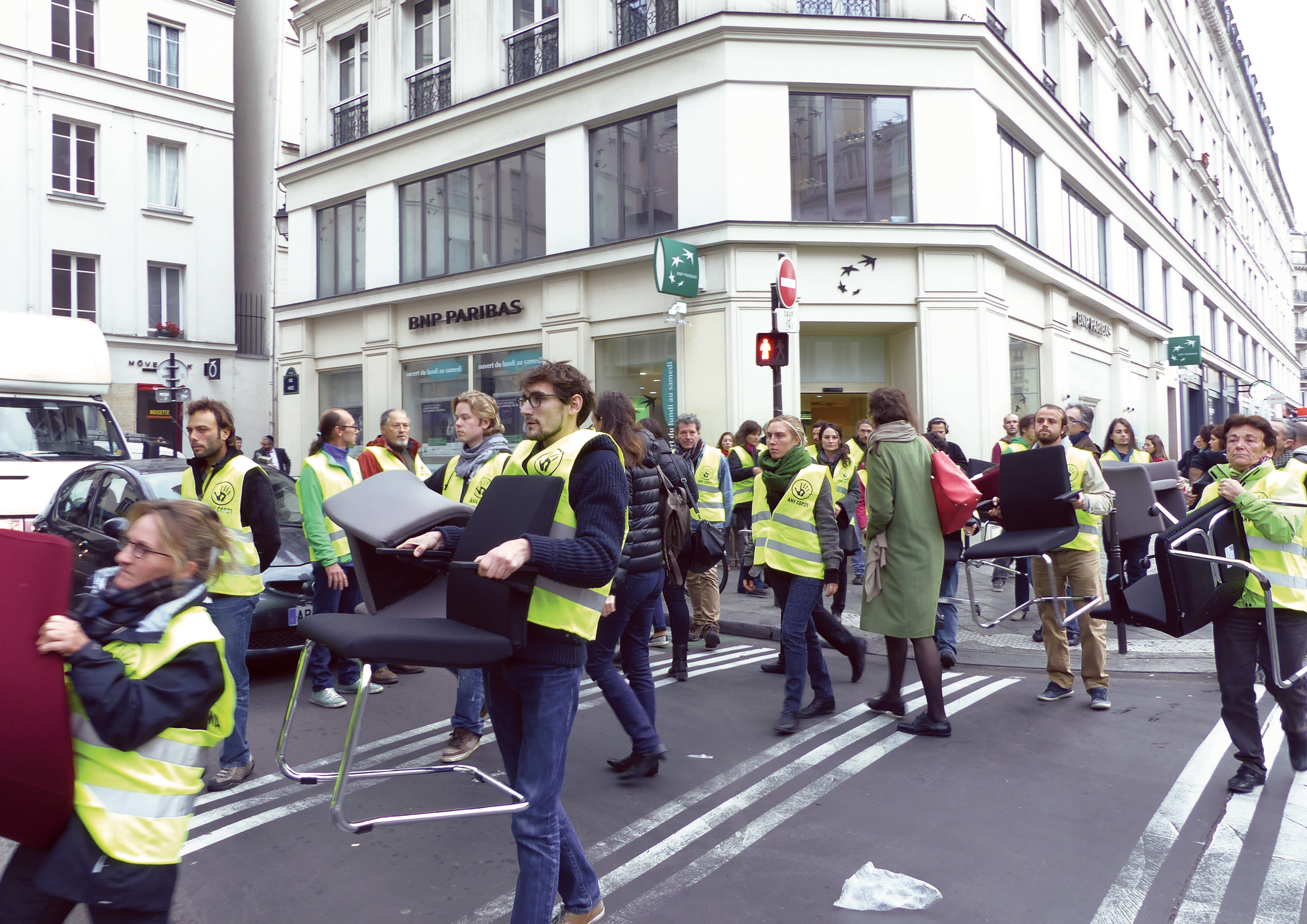 Activistes d'ANV-COP21 réquisitionnant des chaises dans une agence d'une banque BNP-Paribas pour dénoncer l'évasion fiscale.